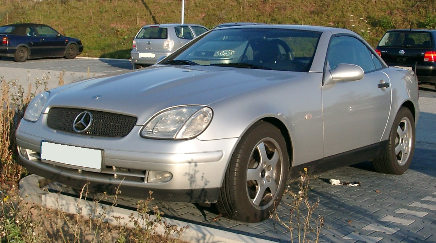 Mercedes-Benz R170 SLK